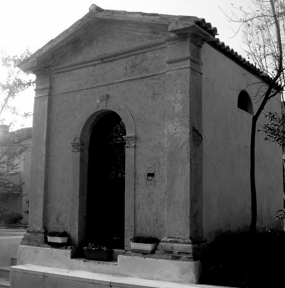 Colle Umberto (Treviso, Italia): capitello di San Belin, struttura votiva ottocentesca.